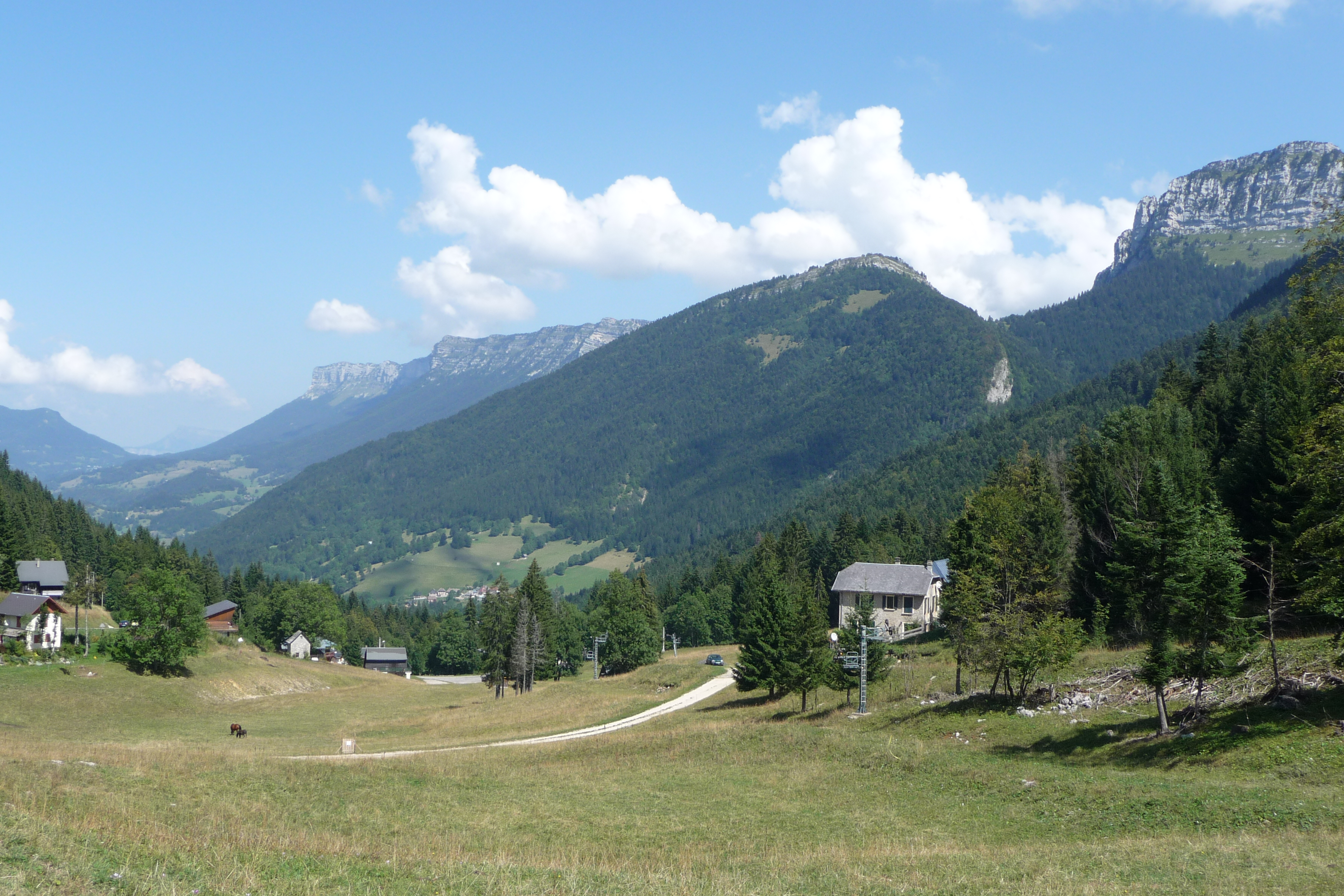 Photo prise depuis le Col du Cucheron, orientation nord/nord-est